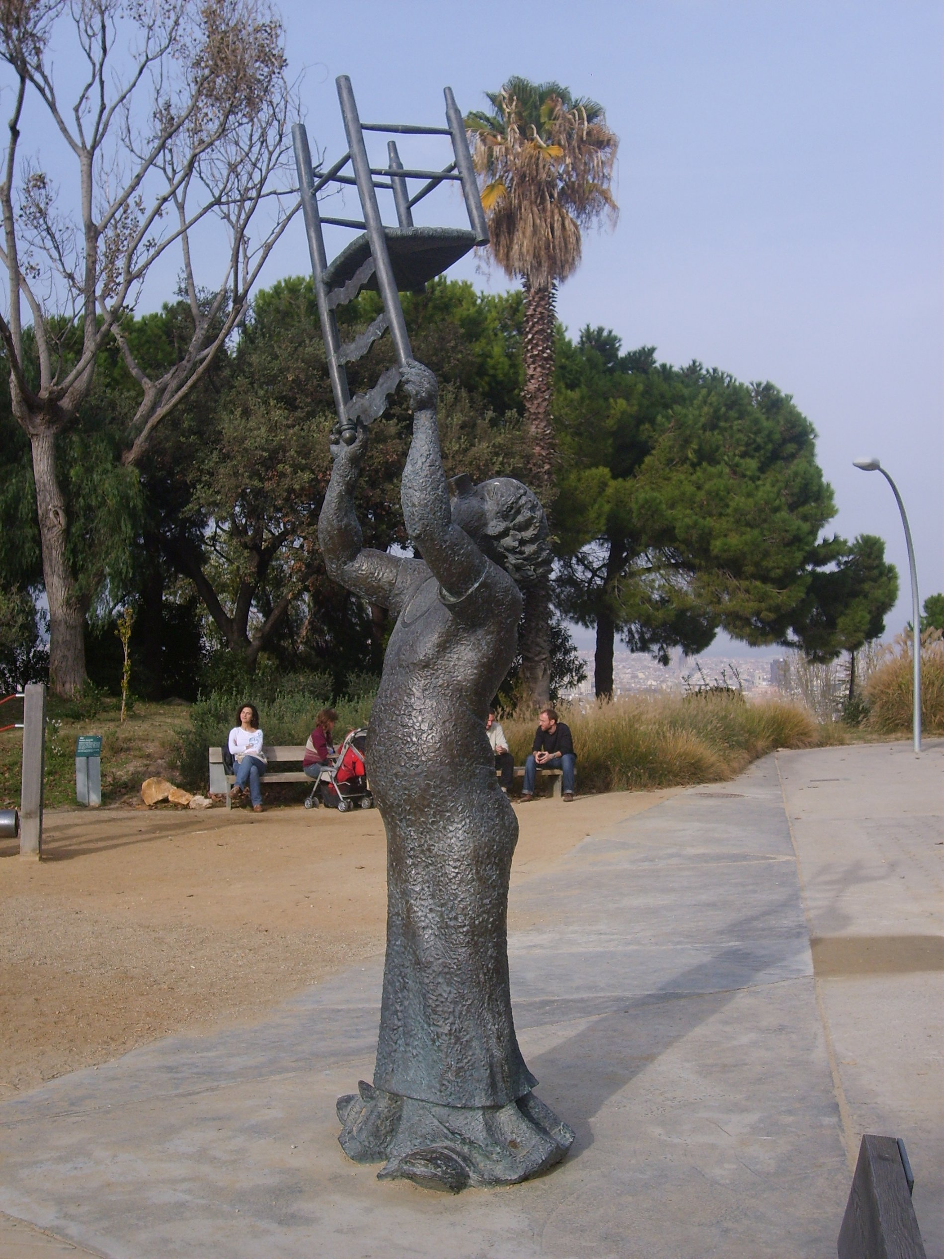 Monument a Charlie Rivel als Jardins de Joan Brossa, a Montjuïc